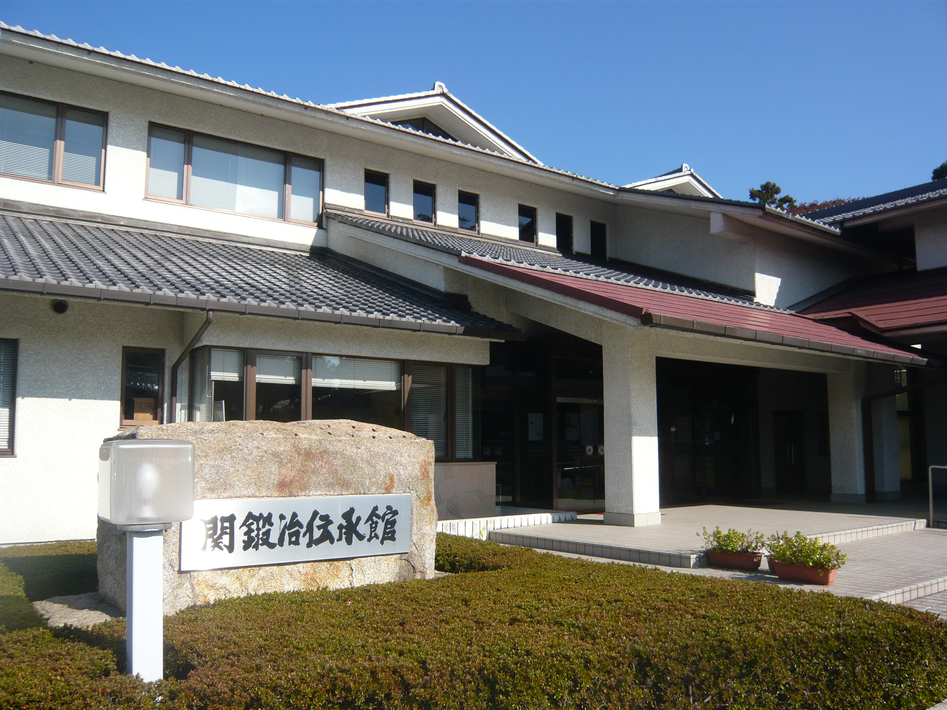 Seki Sword Tradition Museum 関鍛冶伝承館（関鍛冶伝承館）,Seki,Gifu,Japan（岐阜県関市）で撮影。